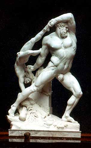 Ercole e Lica (1795), scultura di Antonio Canova nella Galleria nazionale d'arte moderna a Roma.